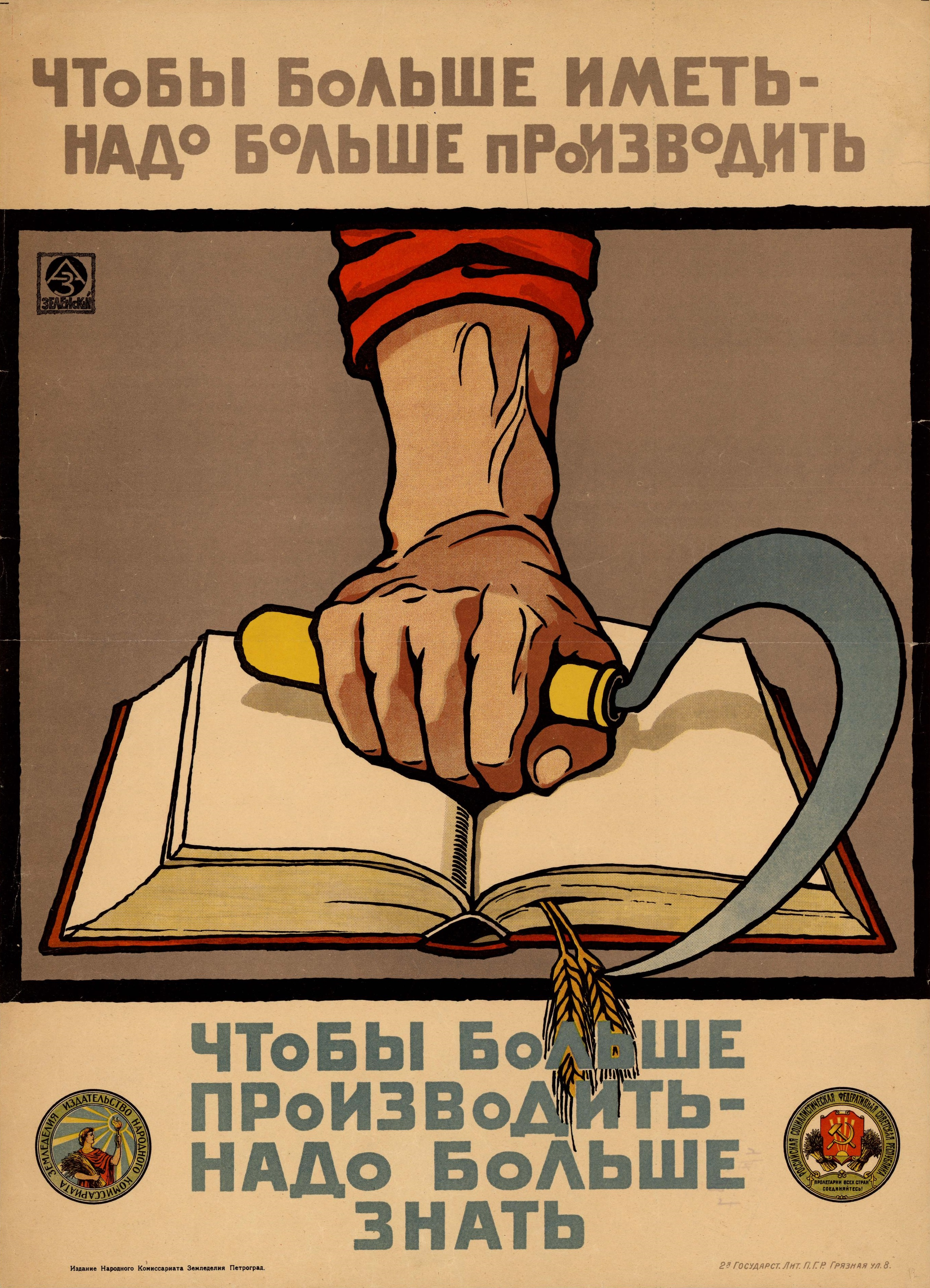 Александр Зеленский. Плакат «Чтобы больше иметь — надо больше производить. Чтобы больше производить — надо больше знать». Петроград: Наркомзем, [1920]. Хромолитография, 65×46 см.